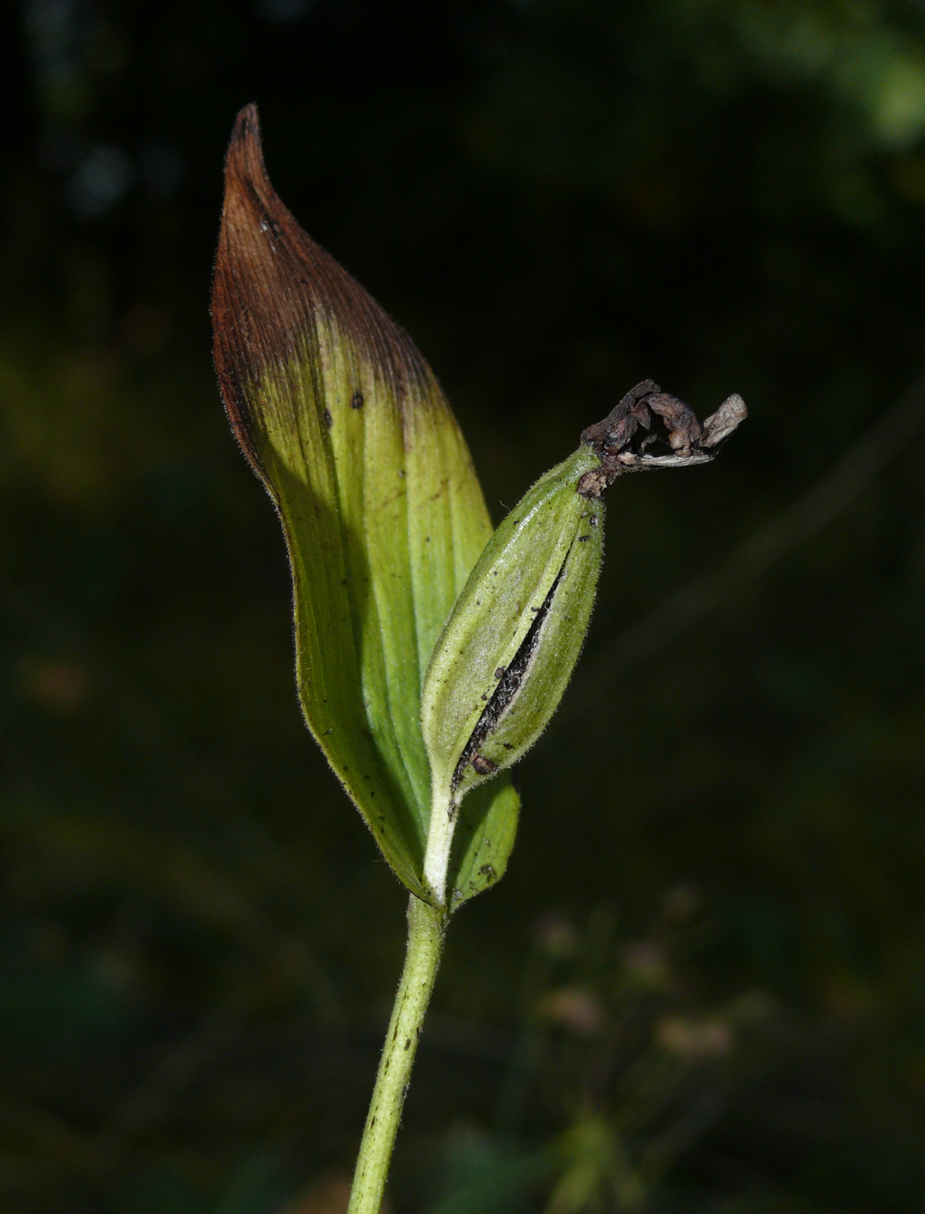 Cypripedium calceolus, Tauberland, Deutschland